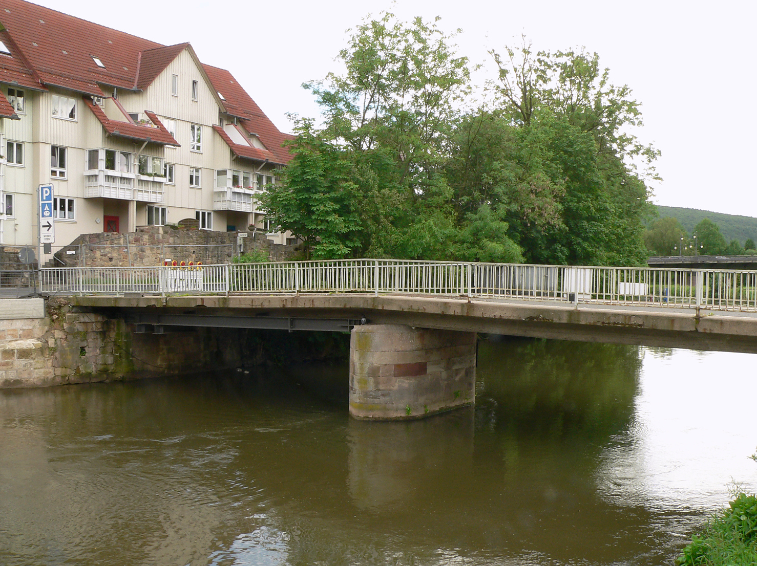 Alte Löwenbrücke in Hann. Münden, der Brückenlöwe am Ufer etwas in Bildmitte rechts neben dem Straßenschild